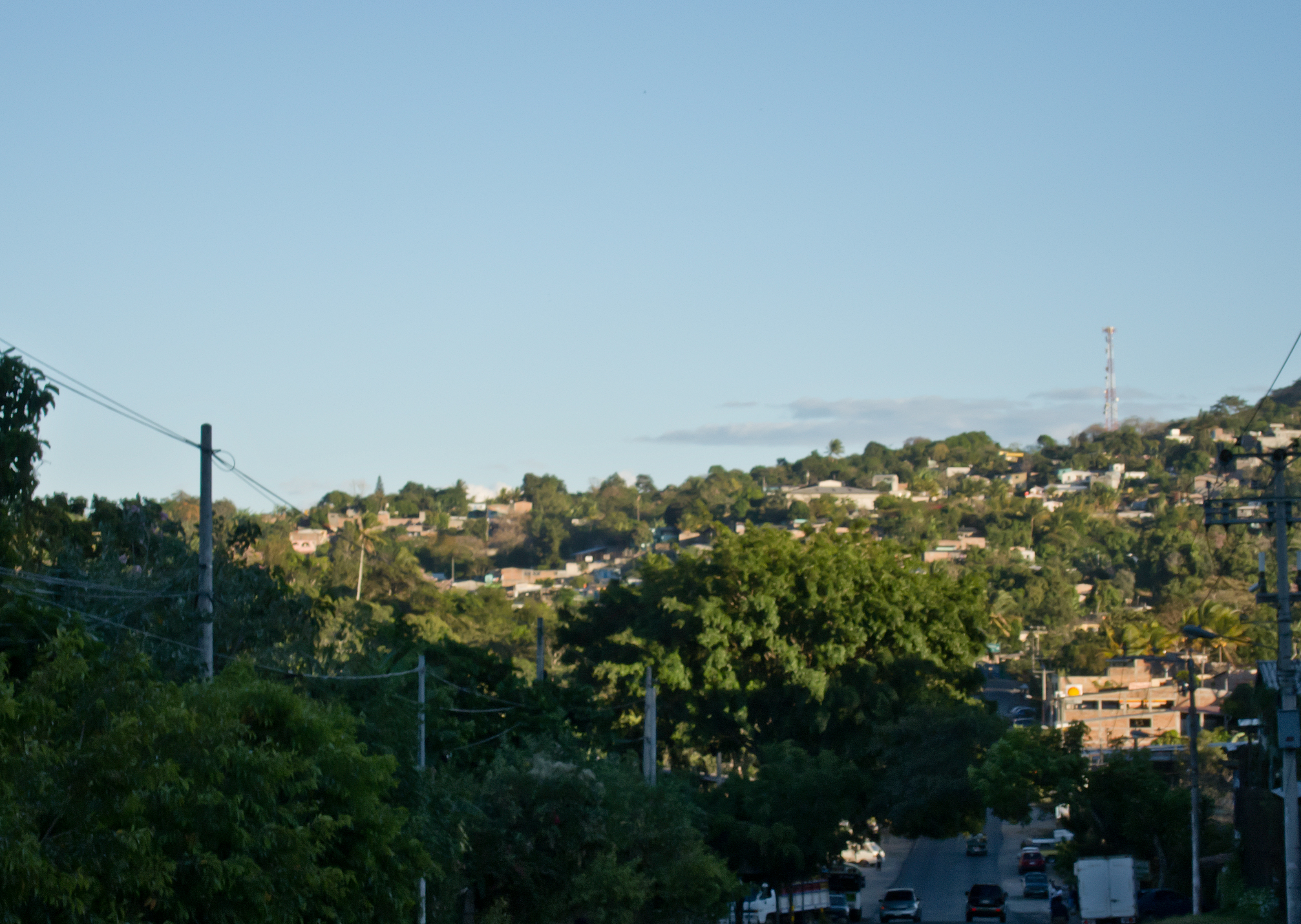 Entrada de la ciudad de Cojutepeque, El Salvador, desde la carretera Panamericana (la calle es la antigua carretera panamericana)